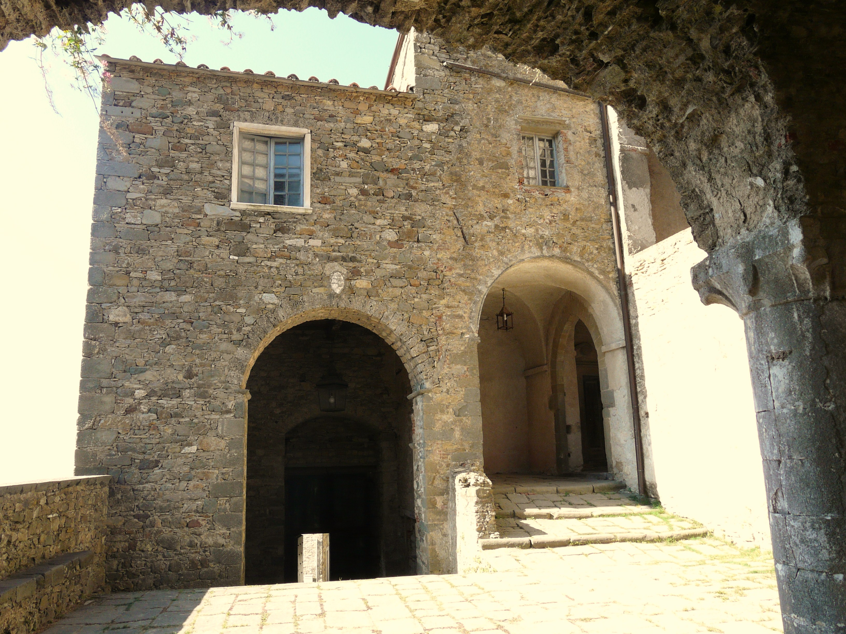 Castello Malaspina, Fosdinovo, Toscana, Italia